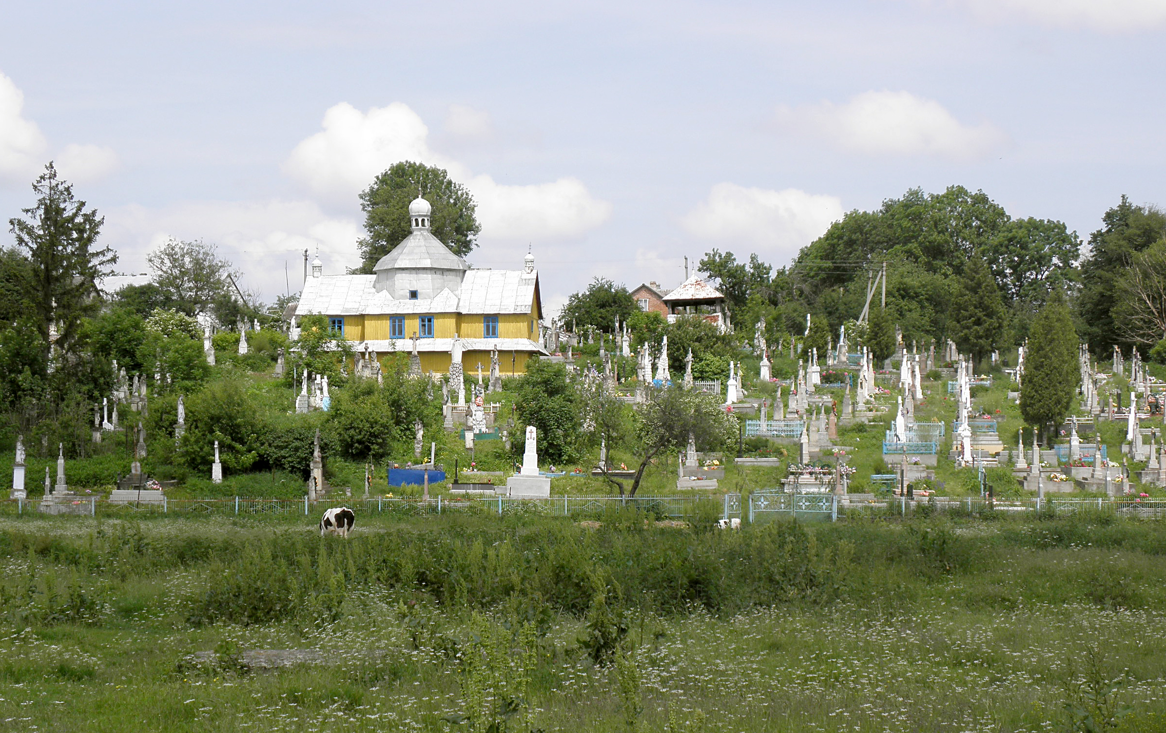 Błąd w nazwie pliku. Na zdjęciu jest: Drewniana cerkiew i cmentarz na Tudyńcu Podhajce (Підгайці) – Staremiasto